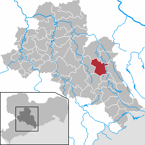 Freiberg in Saxony - district Mittelsachsen